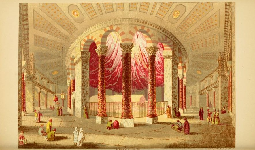 Barclay, The City of the Great King, Innenansicht des Felsendoms 1858